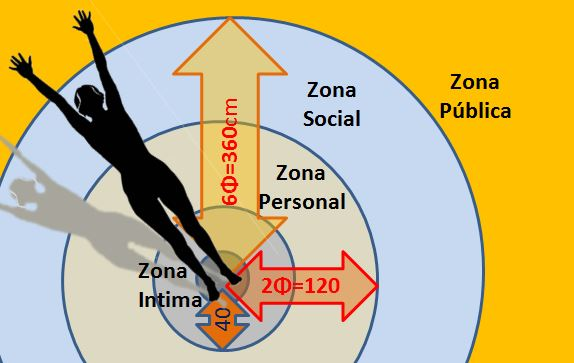 El diagrama describe las distancias proxémicas, según Eduard Hall y la relación con la sección áurea que utiliza Ibo Bonilla para calcular el "cubo de aire áureo".